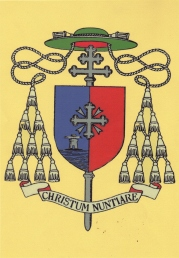 Stemma Piero Biggio